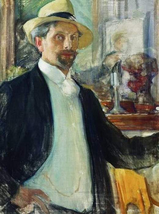 Автопортрет. 1908 Холст, масло. 76 x 57 см Псковский государственный объединенный историко-архитектурный и художественный музей-заповедник